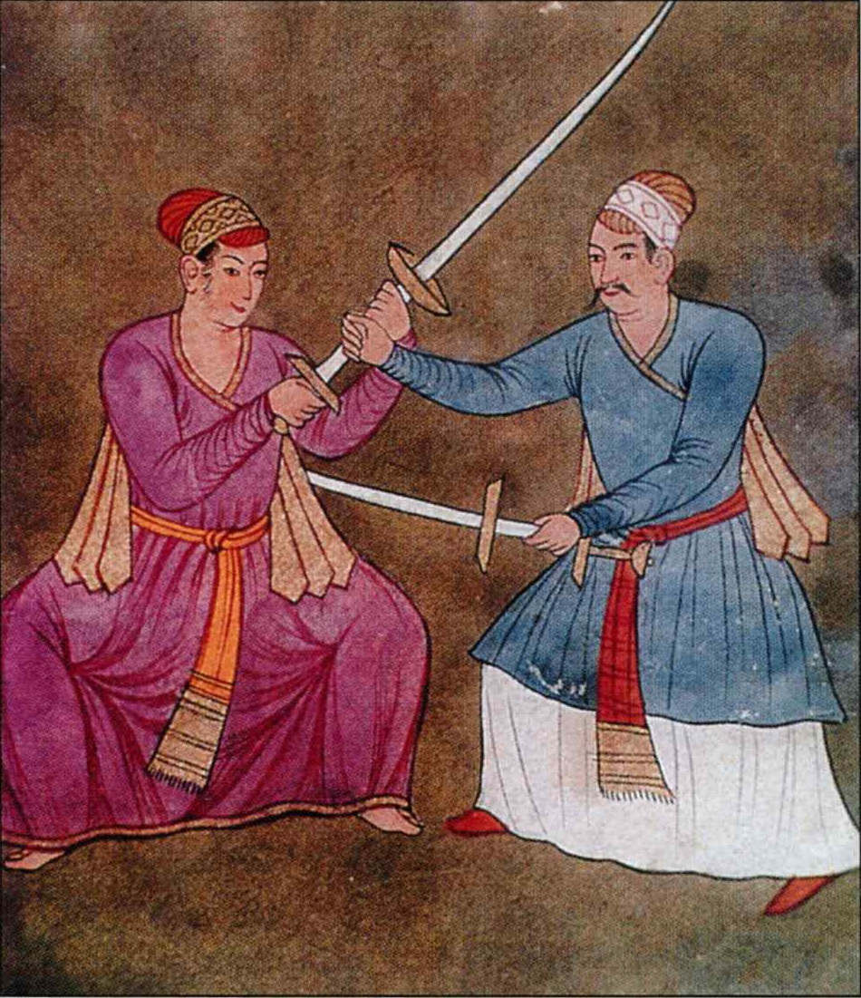 Обучение бою на мел путтах бемох. Ниханг-нама.